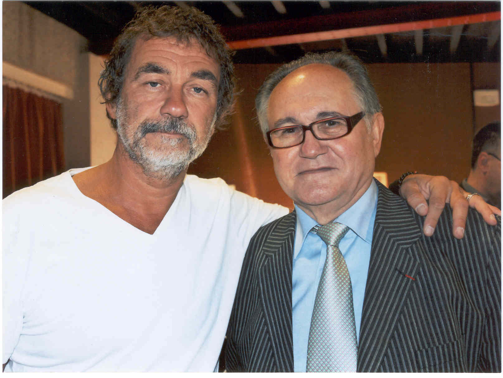 Olivier Marchal et Guy Penaud